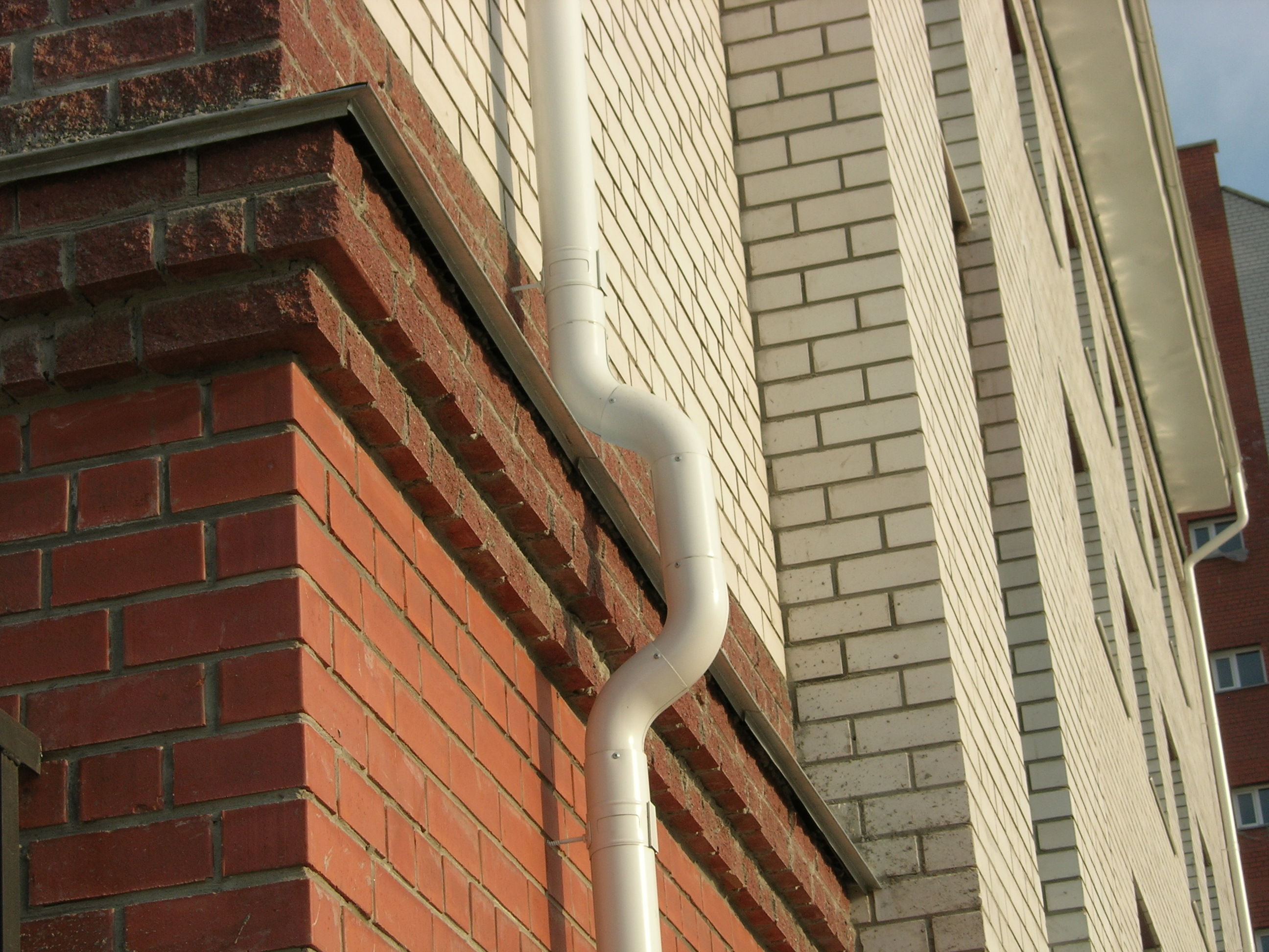 Водосточная труба огибает здание